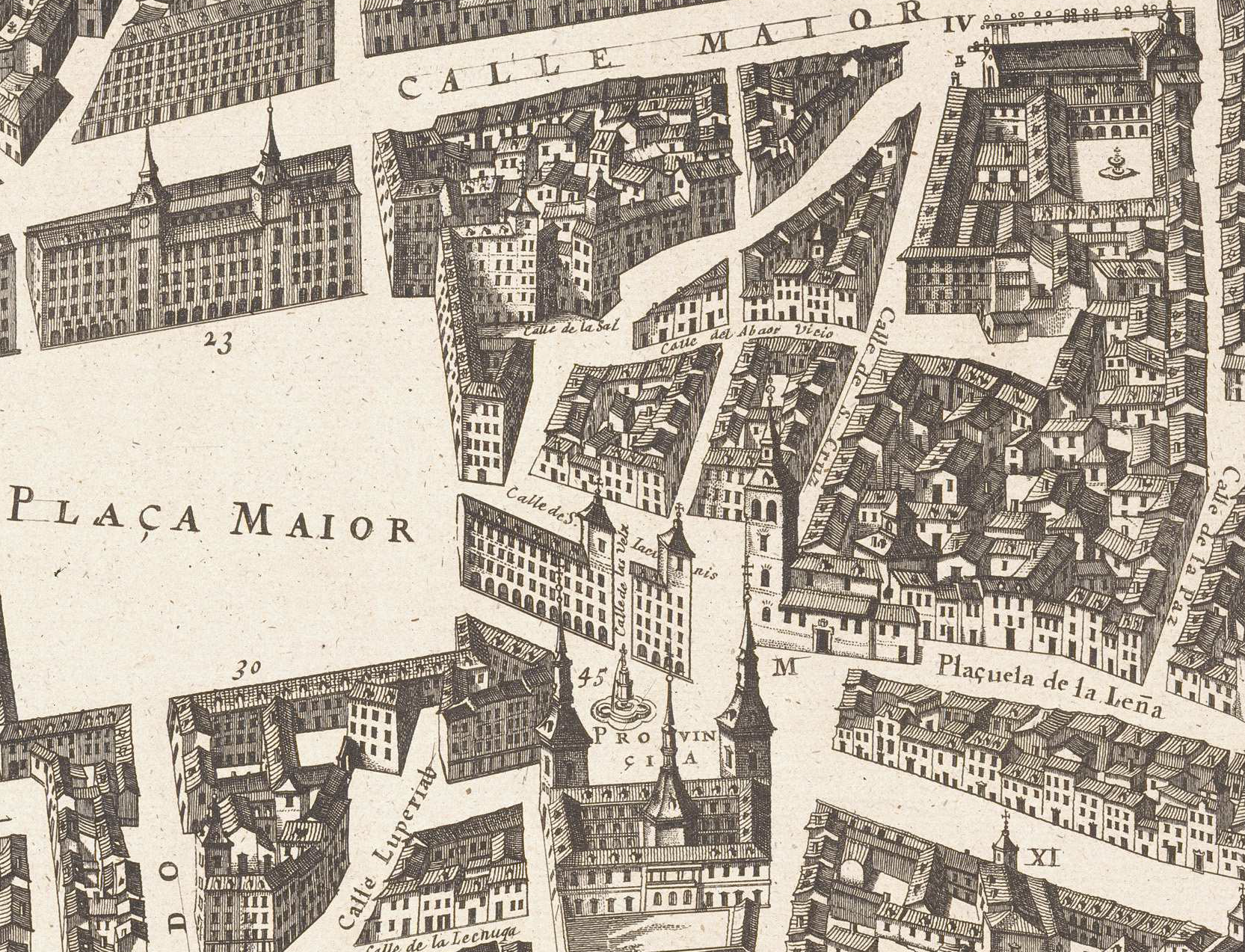 Plaza Mayor y plazuelas de Provincia y La Leña en la confluencia de la Subida de Santa Cruz (Esparteros) y Atocha.